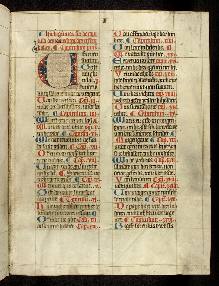 Lombarden im "Sachsenspiegel und Schwabenspiegel" Cod. Pal. germ. 167. Herzogtum Braunschweig-Lüneburg, Anfang 14. Jh.